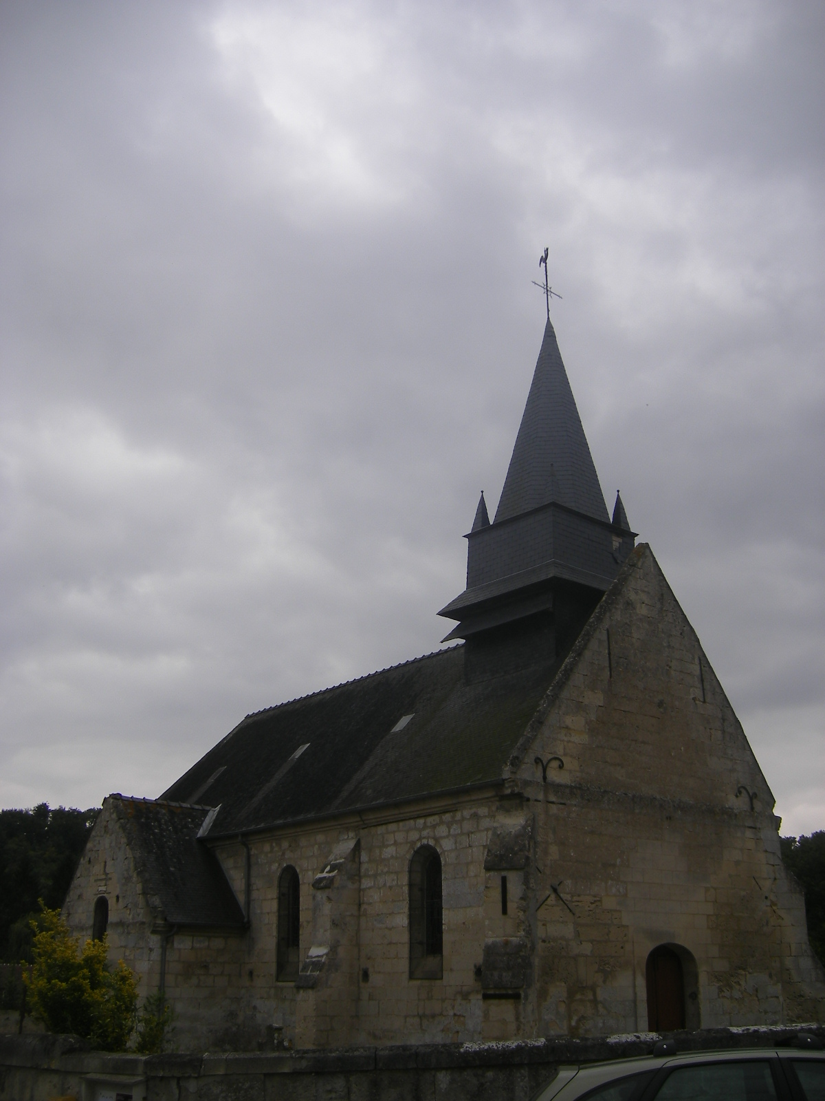 Blérancourdelle